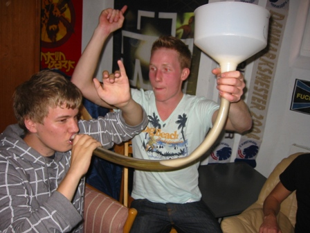 Viser ligeledes hvordan instrumentet anvendes under tilråb og applaus